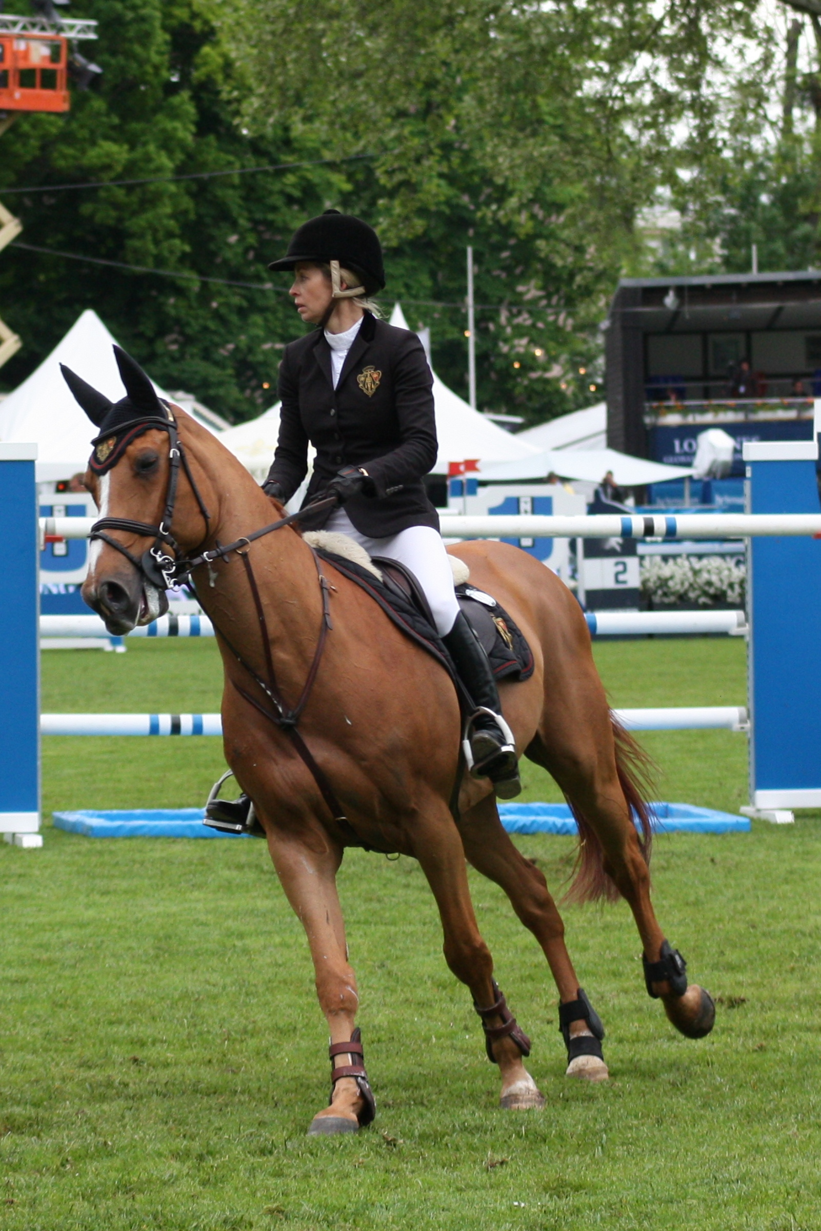 77. Internationanles Wiesbadener Pfingstunier 2013, CSI***** Eröffnungsspringen, Edwina Tops-Alexander auf Cevo Itot du Chateau Personality rights warning Although this work is freely licensed or in the public domain, the person(s) shown may have rights that legally restrict certain re-uses unless those depicted consent to such uses. In these cases, a model release or other evidence of consent could protect you from infringement claims.